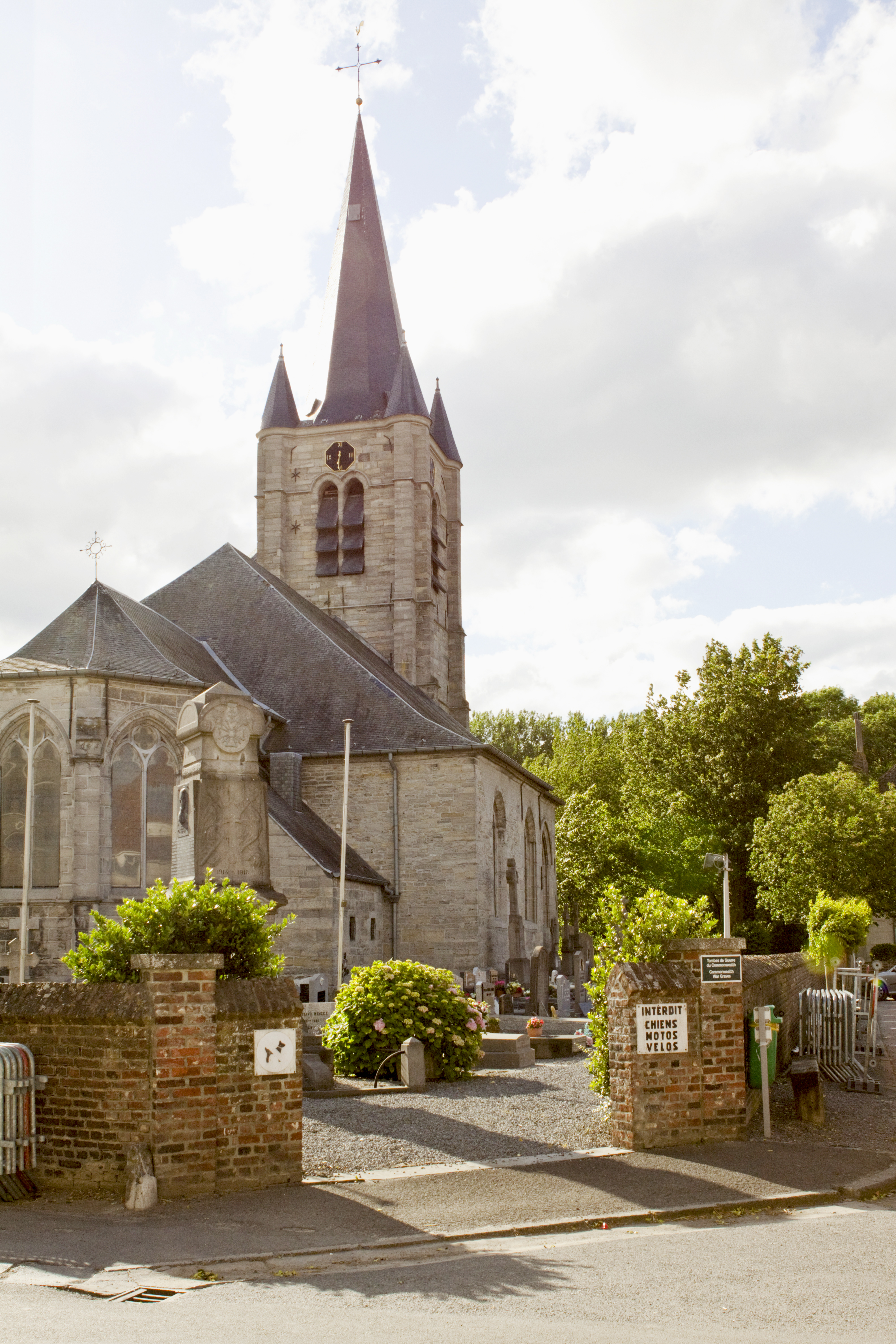 St. Leger Churchyard